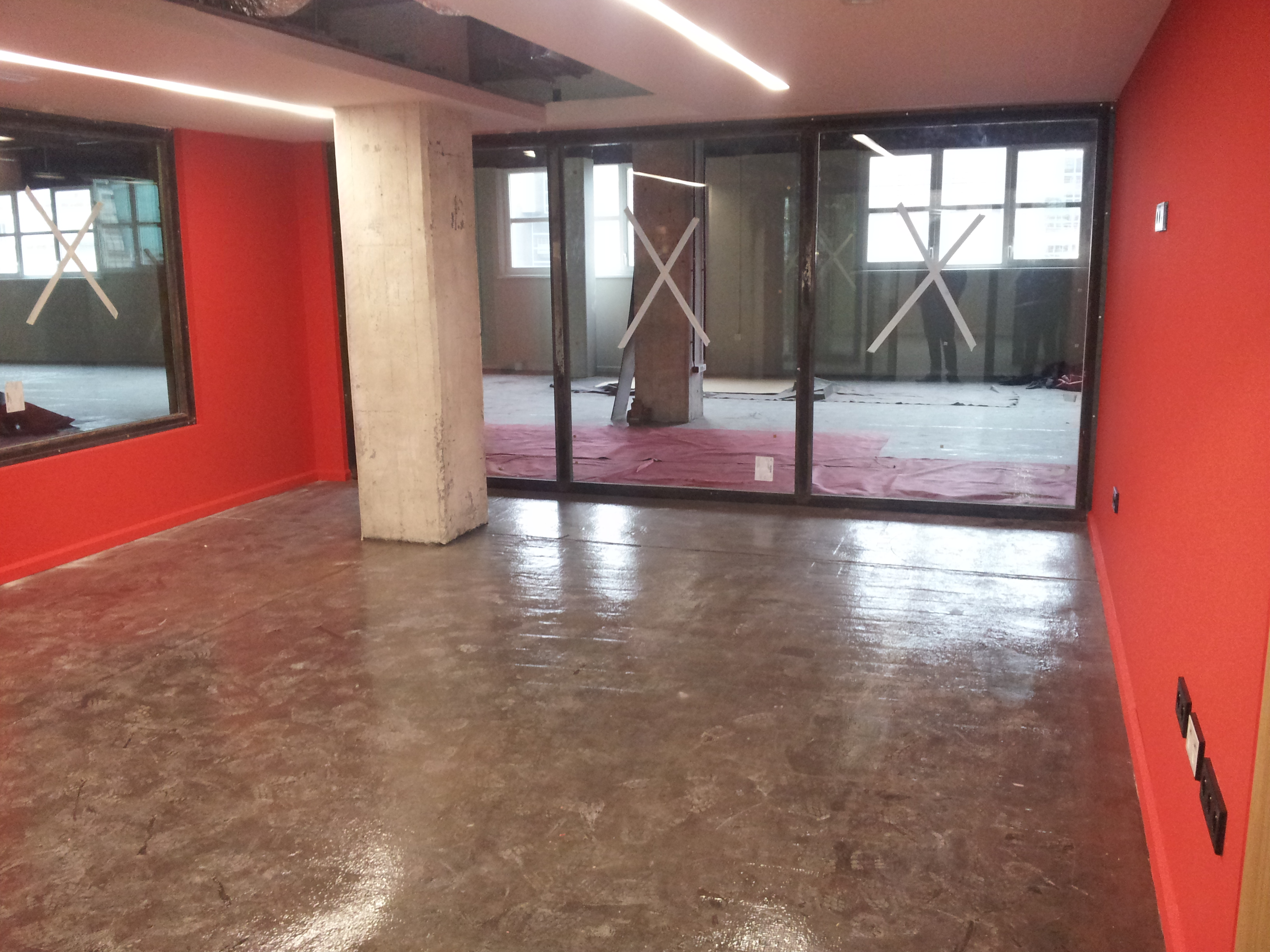 Le chantier du Shadok, à Strasbourg